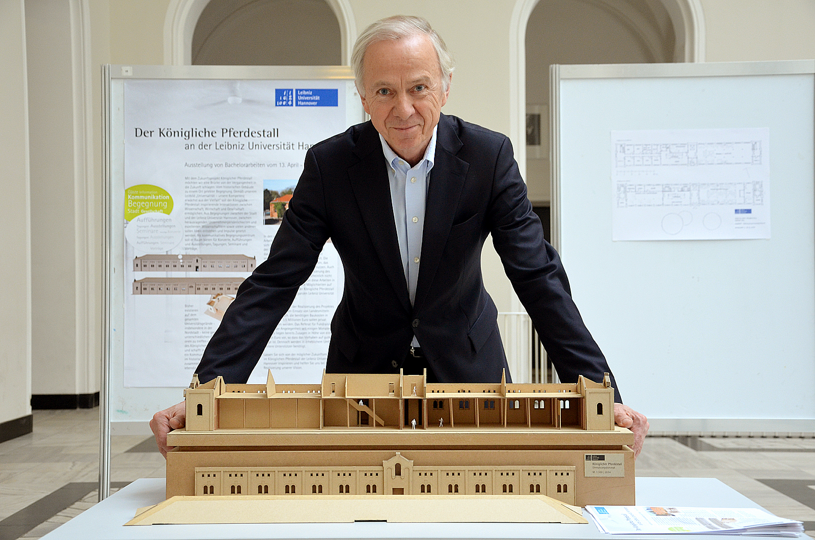 Professor Erich Barke am 13. April 2015 während der Ausstellung der Bachelorarbeiten zum Thema Königlicher Pferdestall an der Leibniz Universität Hannover, hier vor einem laut seiner Aussage von Universität-Angestellten produzierten, nicht urheberrechtlich geschützten Modell des denkmalgeschützten, ehemals von den preussischen Ulanen genutzten Gebäudes, das nach einer Sanierung und Innenumbau zur Mensa umfunktioniert werden soll ...